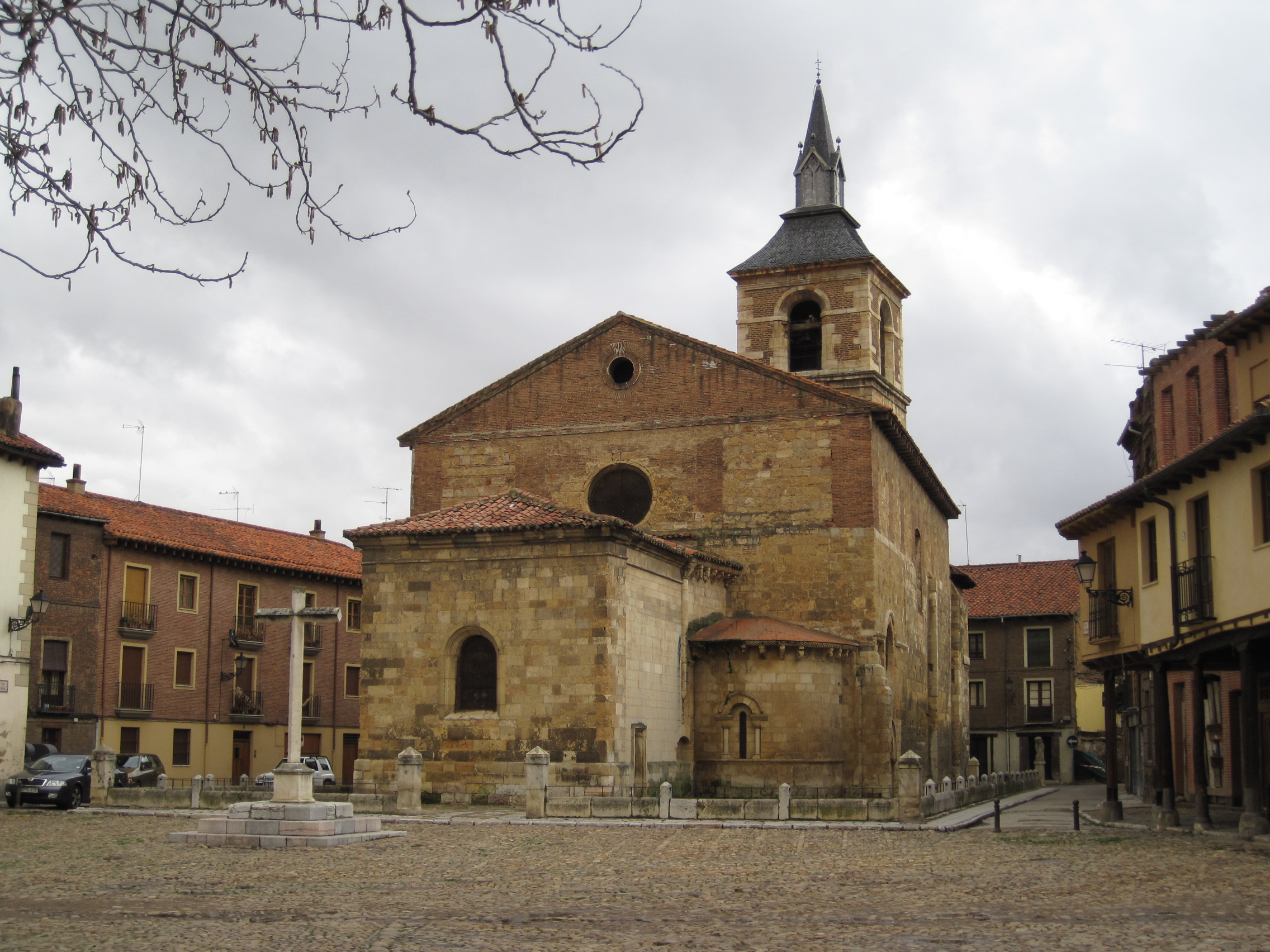 Iglesia de Nuestra Señora del Mercado, León (España).